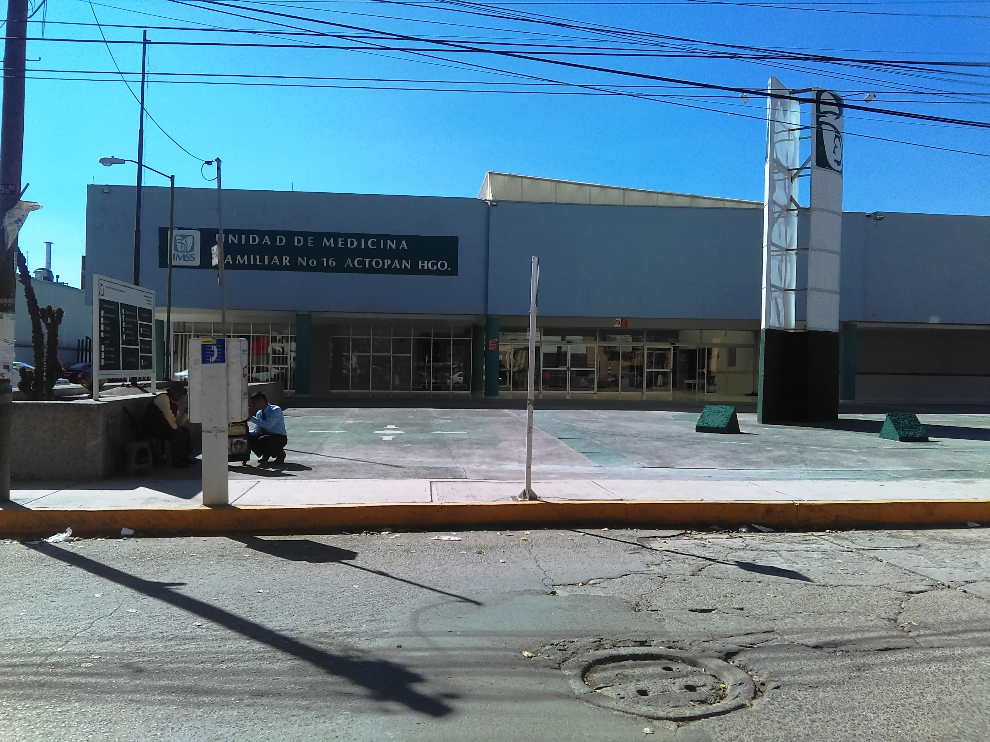 Unidad de Medicina Familiar del IMSS en Actopan, Hidalgo